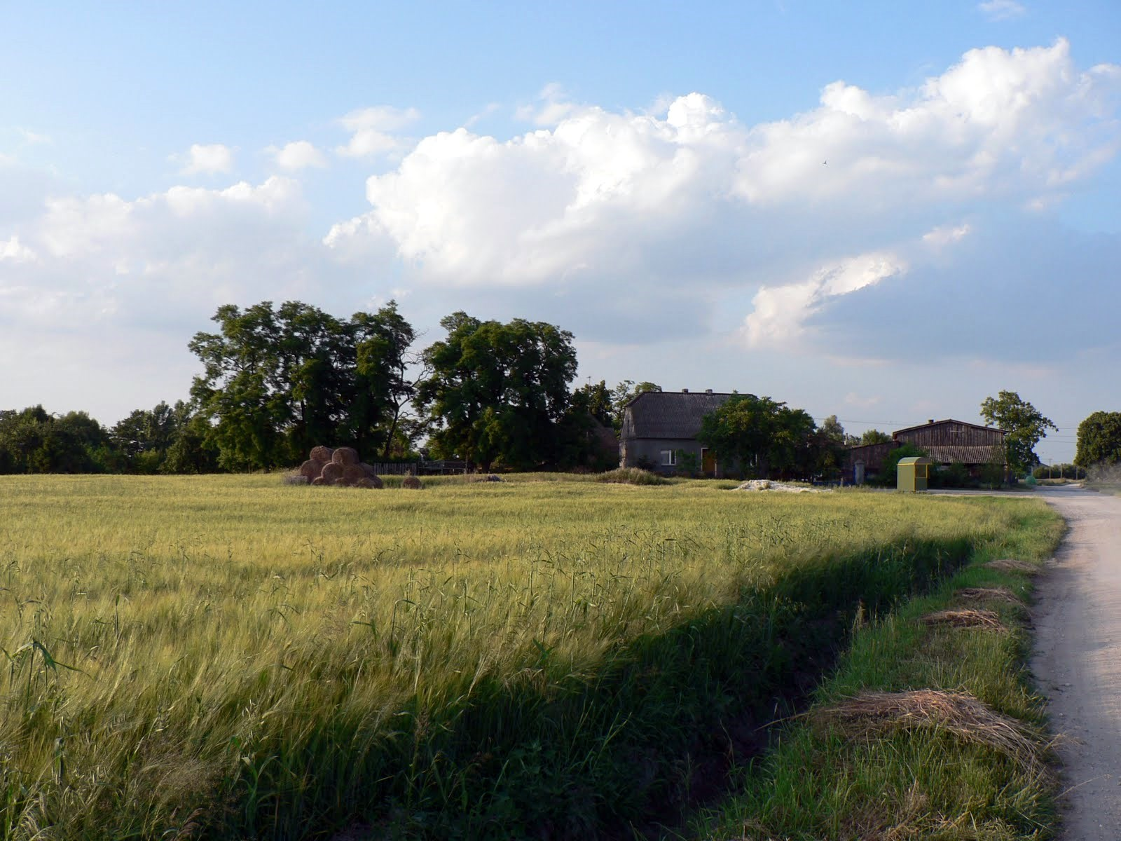 Droga w Krzyżownicy